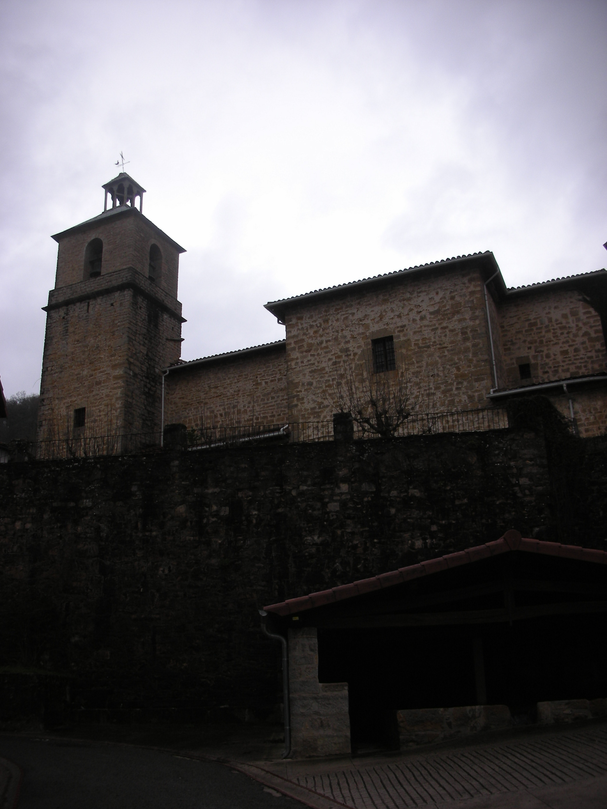 Parroquia de San Esteban, en Echalecu, valle de Imotz (Navarra)